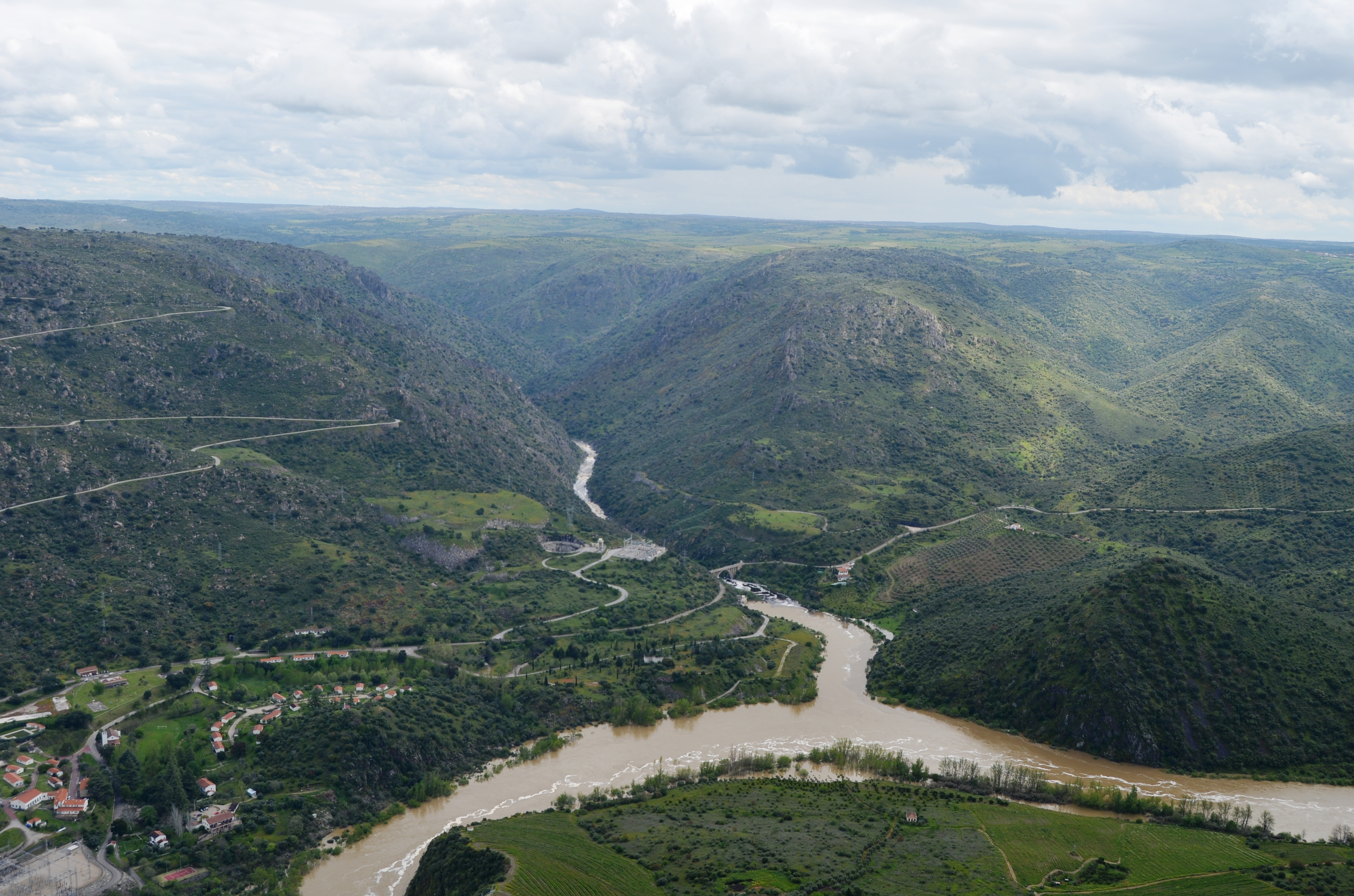 Where waters meet